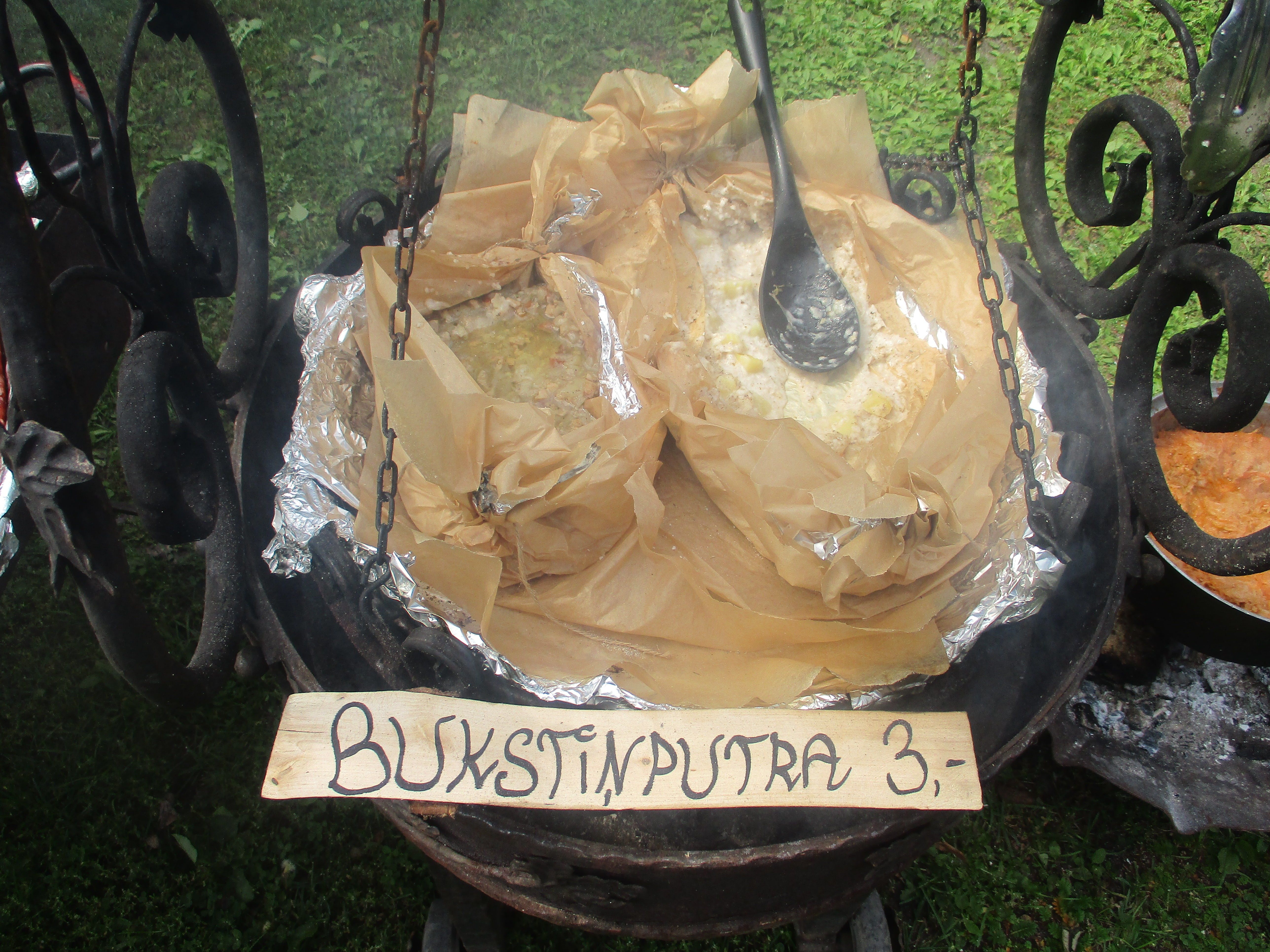 Bukstiņputra